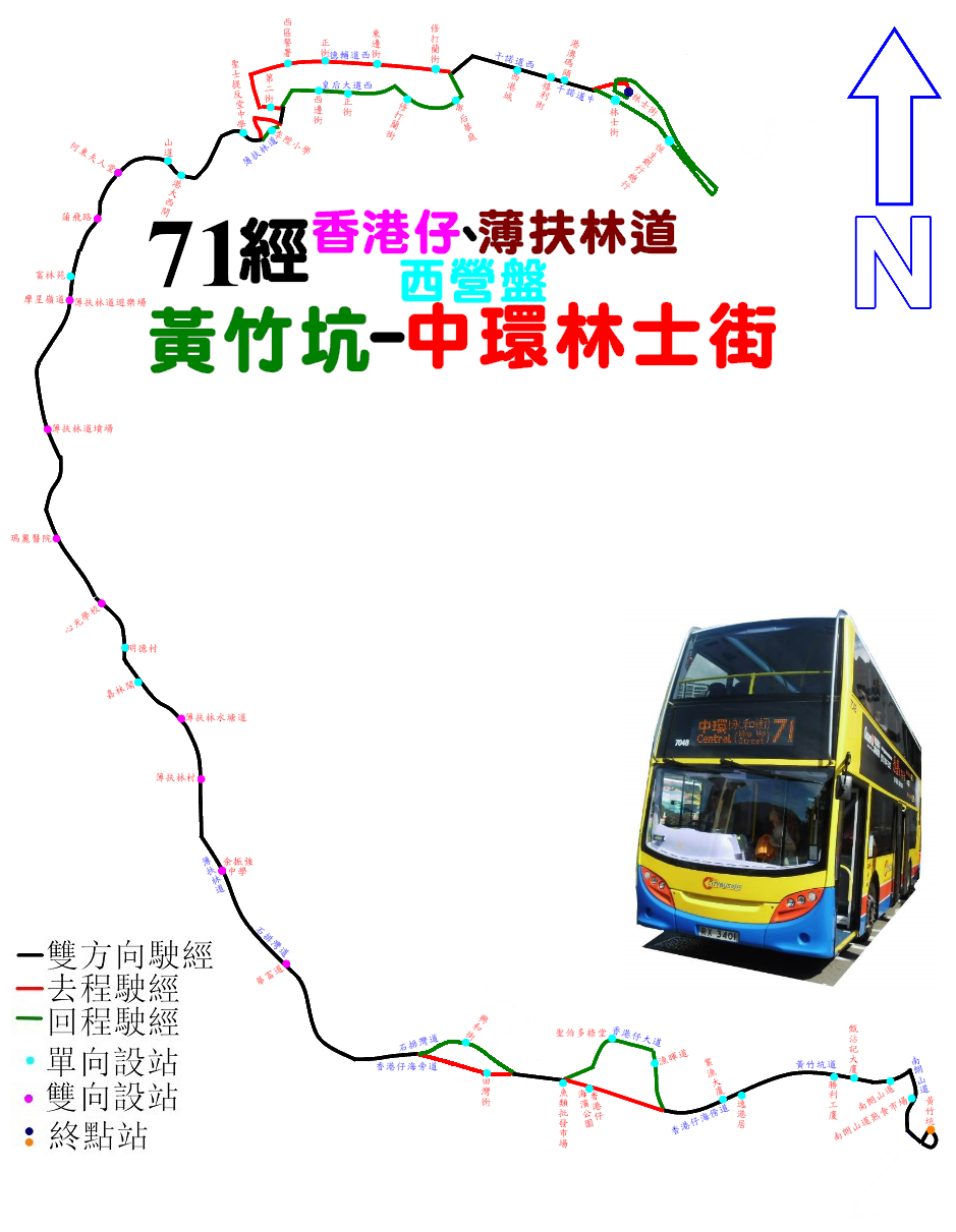 中文（香港）: 城巴71線的走線圖